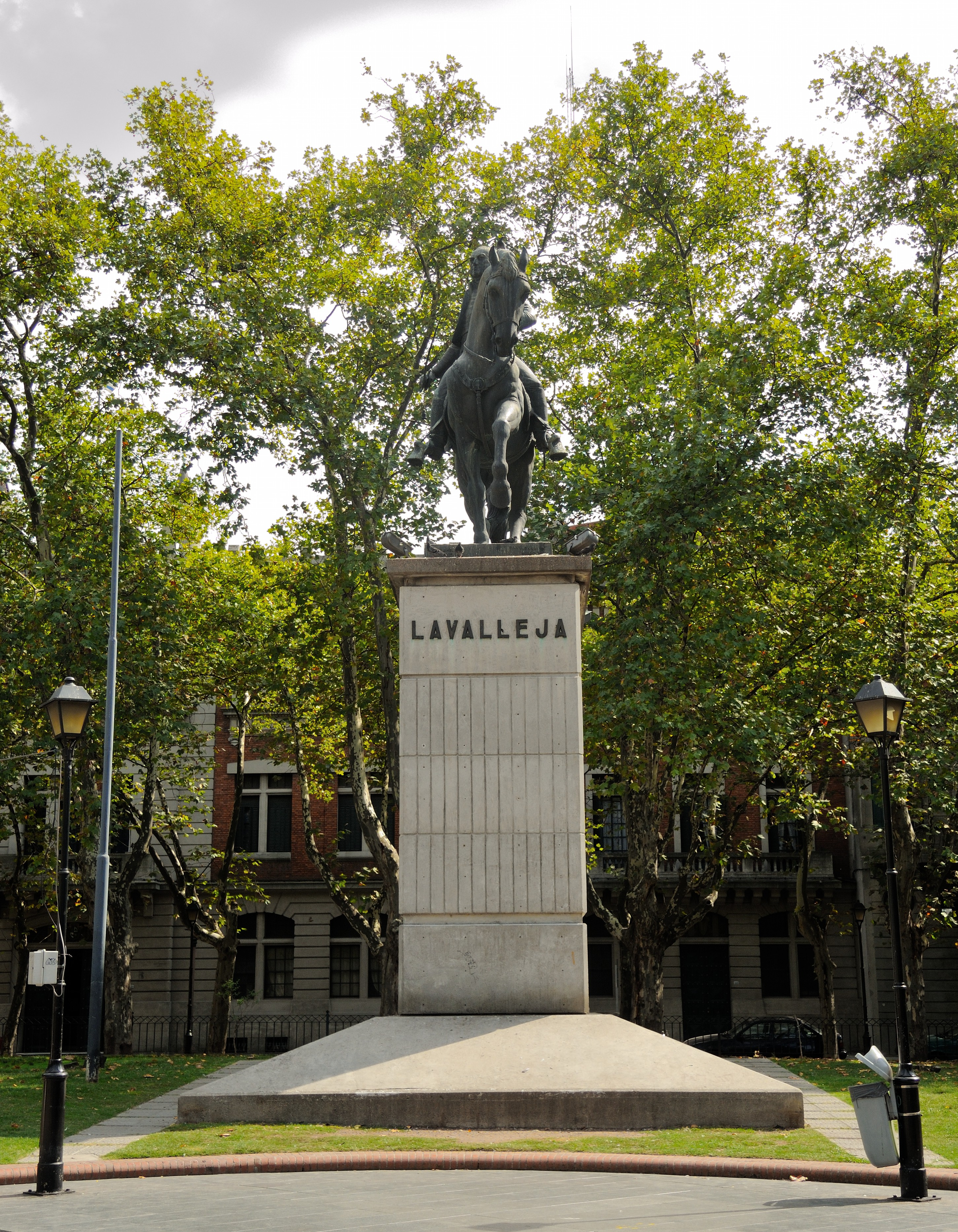 Monumento a Juan Antonio Lavalleja en la Plaza de los Treinta y Tres, Montevideo, Uruguay